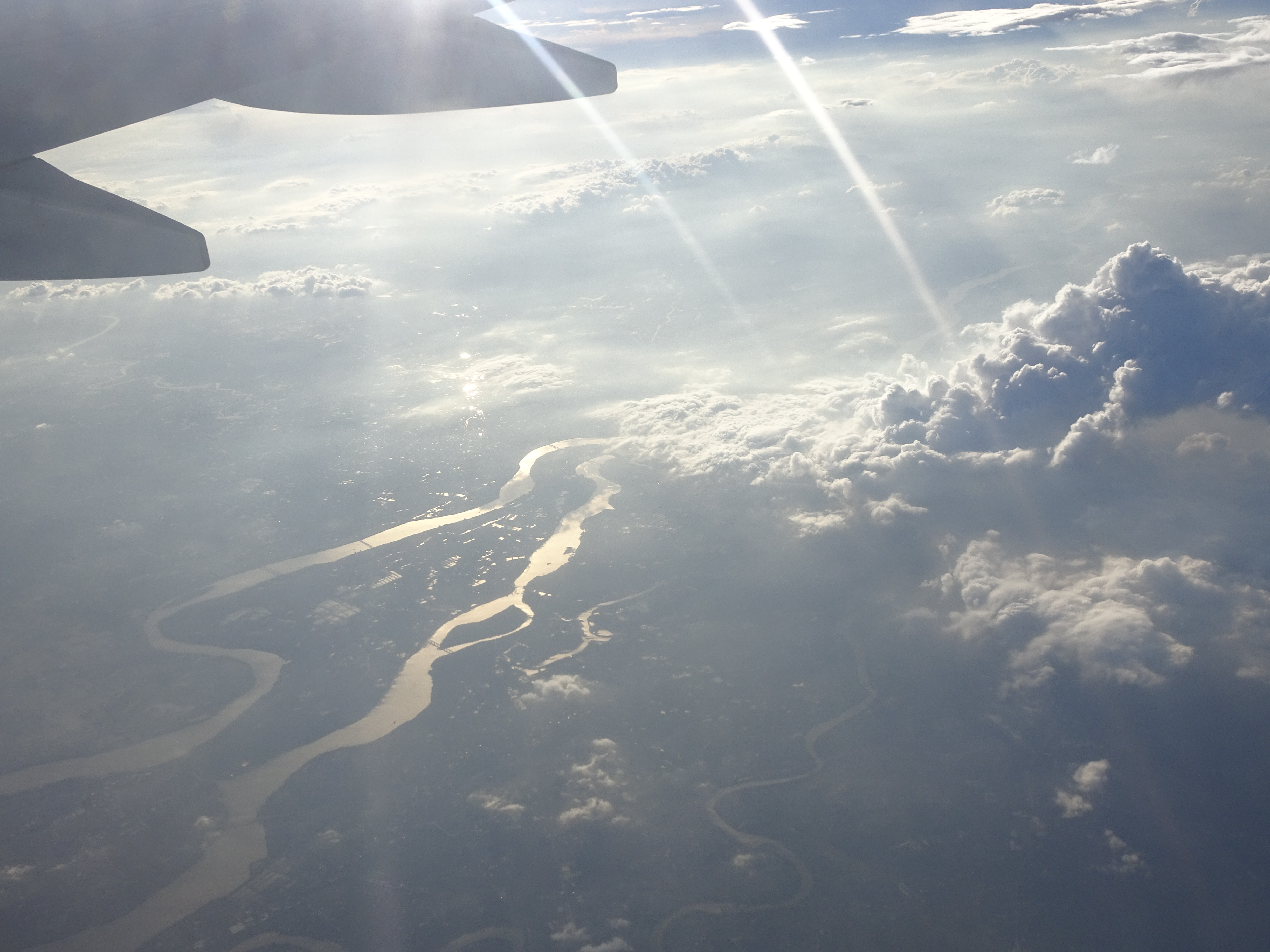 在福建省、廣東省交界處的上空拍攝的韓江（民航機）